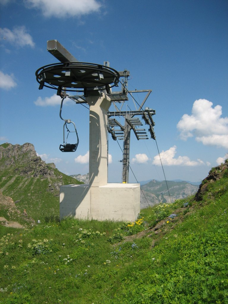 Obere Umlenkscheibe einer Einer-Sesselbahn